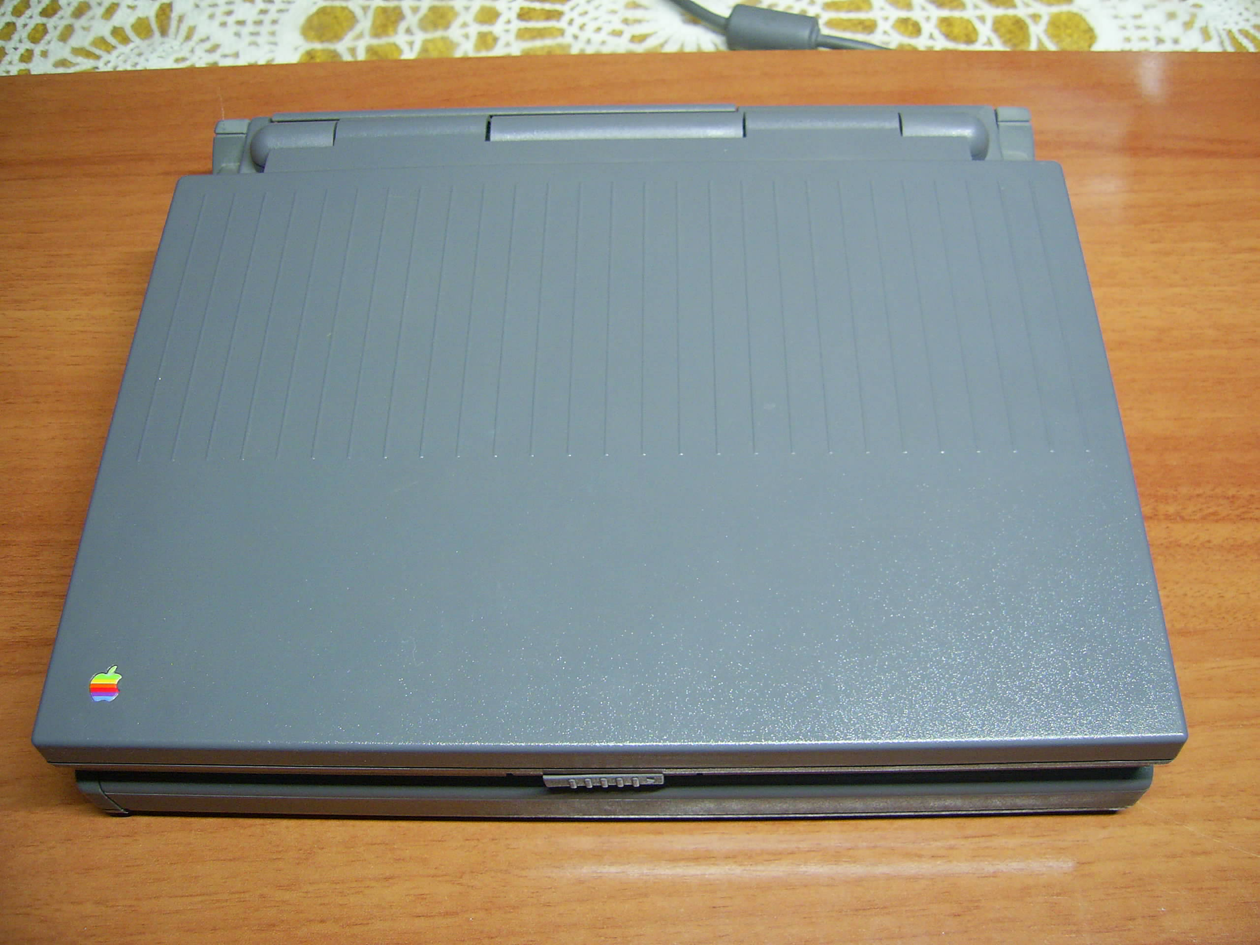 PowerBook 165 cerrado